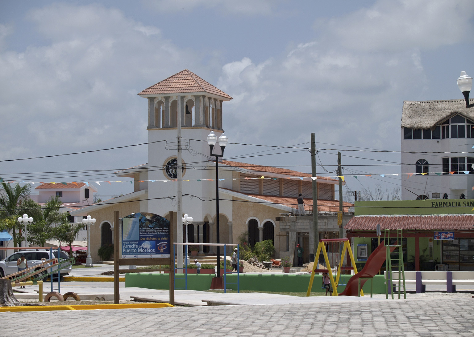 Plaza de Puerto Morelos (Quintana Roo, México)